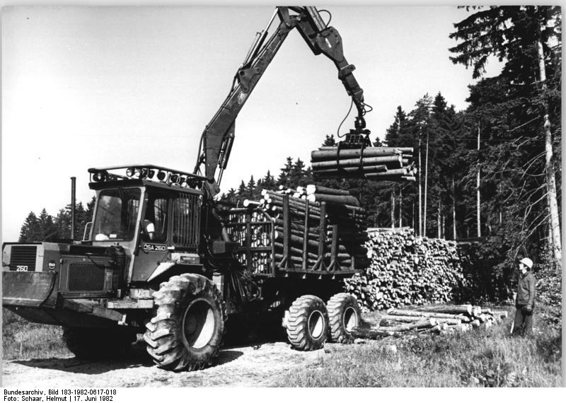 Hildburghausen, Bergen von Bruchholz ADN-ZB Schaar 17.6.1982 Bez. Suhl-Bruchholzaufbereitung: Weit über 600.000 Kubikmeter Schneebruchholz wurden bisher von den Kollektiven der Forstwirtschaft des Bezirkes Suhl und den fleißigen Helfern aufgearbeitet. Moderne Technik hilft im Staatlichen Forstwirtschaftsbetrieb Hildburghausen bei der schnellen Räumung des Bruchholzes aus den Wäldern. - siehe auch 1982-0617-17N - Zum Tag der Genossenschaftsbauern und Arbeiter der sozialistischen Land- und Forstwirtschaft